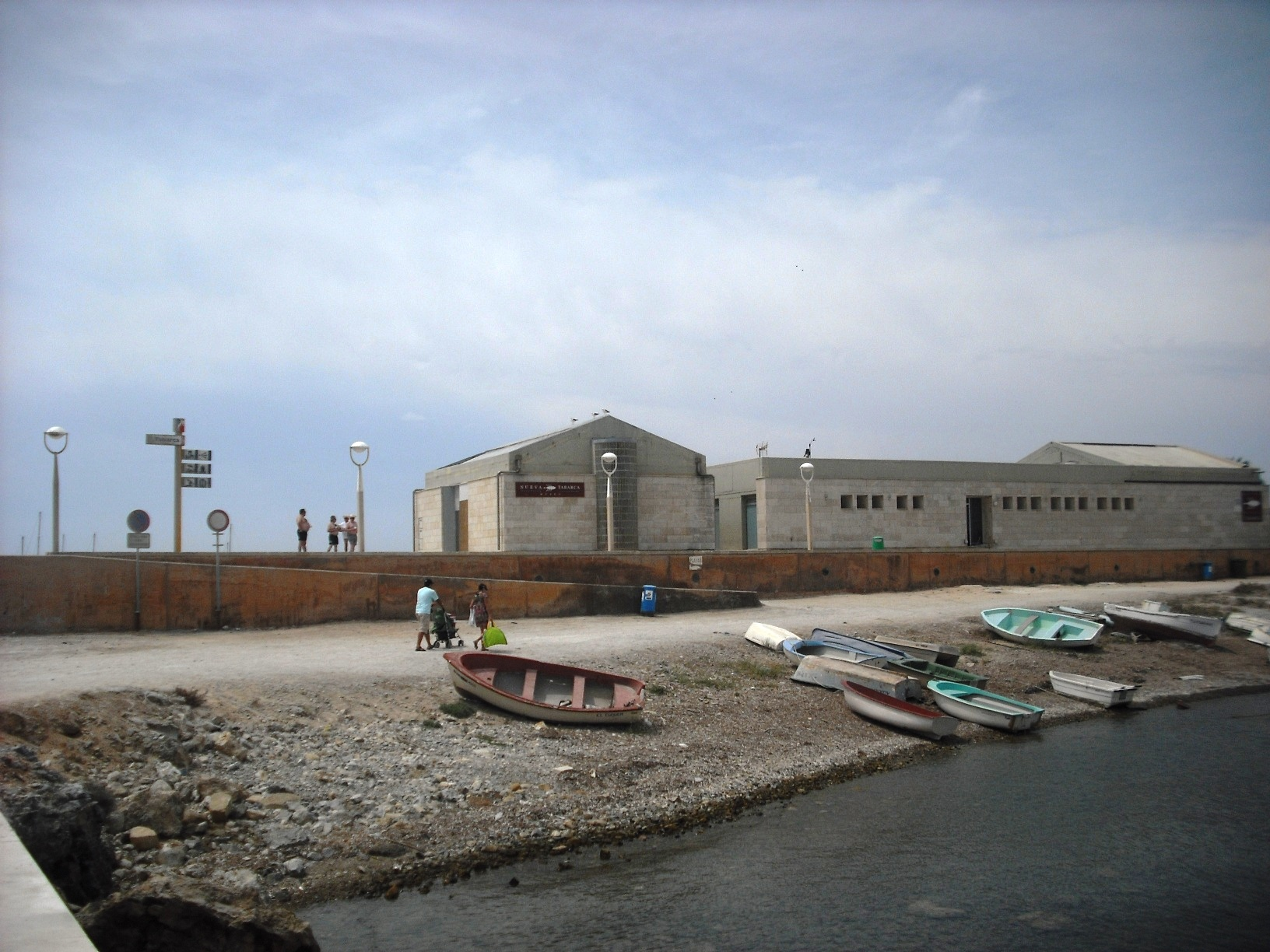 Almadraba (Museu Nova Tabarca) i port.